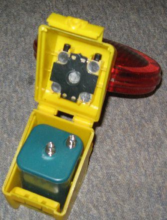 Eine rote Warnleuchte, geöffnet, mit 6V Blockbatterie